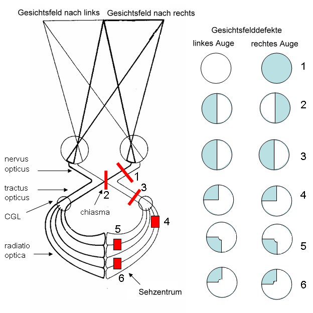 German translation (deutsche Übersetzung)